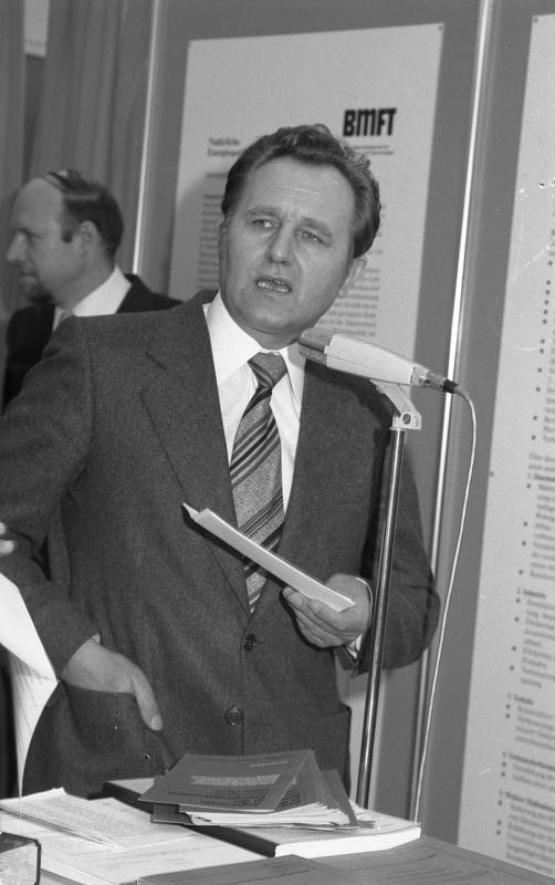 Industriemesse Hannover 1978 Staatssekretär Erwin Stahl besichtigt den Innovationsmarkt